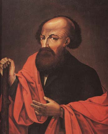 Portrait of Nikita Demidov (1656-1725)